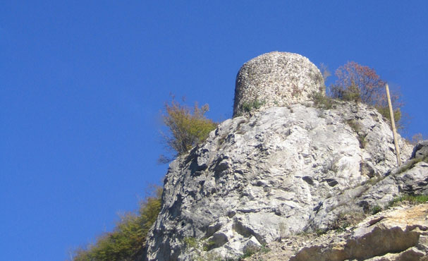 Српски (ћирилица): Средњовјековна кула у Вишеграду, у близини моста Мехмед паше Соколовића